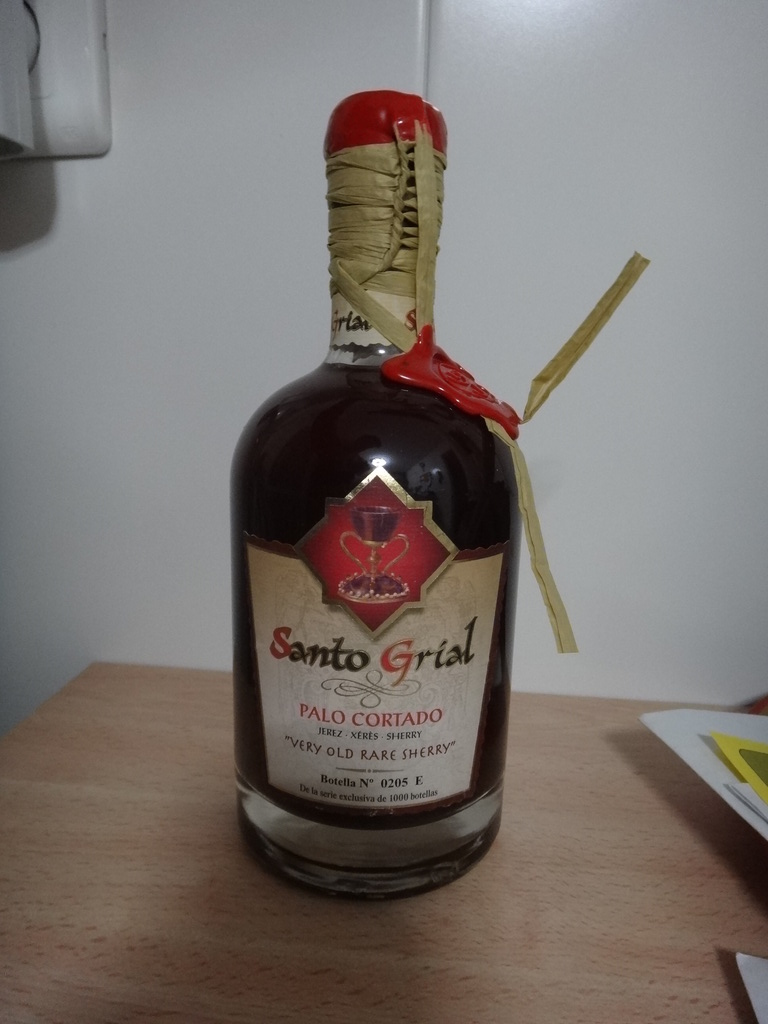 Botella de Sherry Palo Cortado "Santo Grial", de CAYDSA